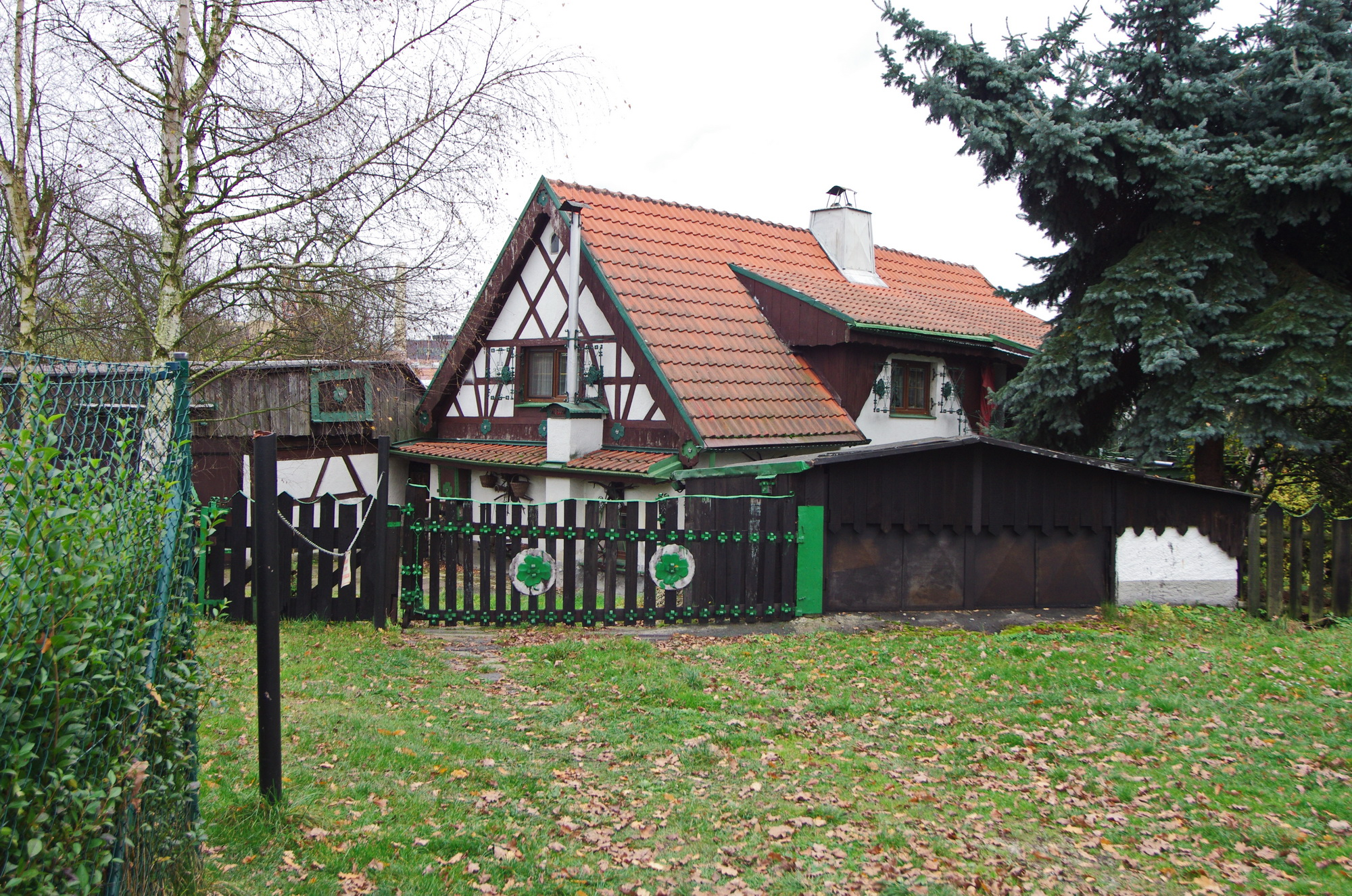 hrázděná chalupa, Hlavno, okres Sokolov